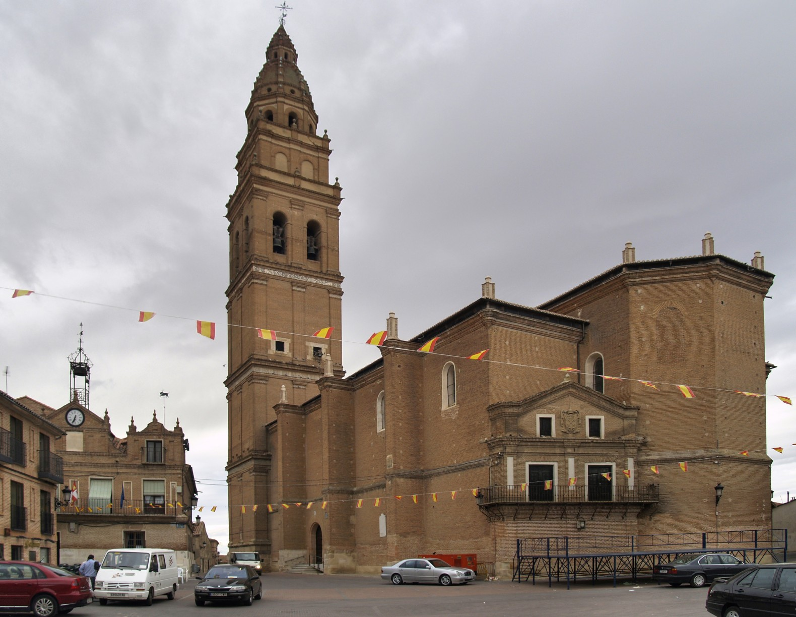 Iglesia de San Pedro en Alaejos (Valladolid)